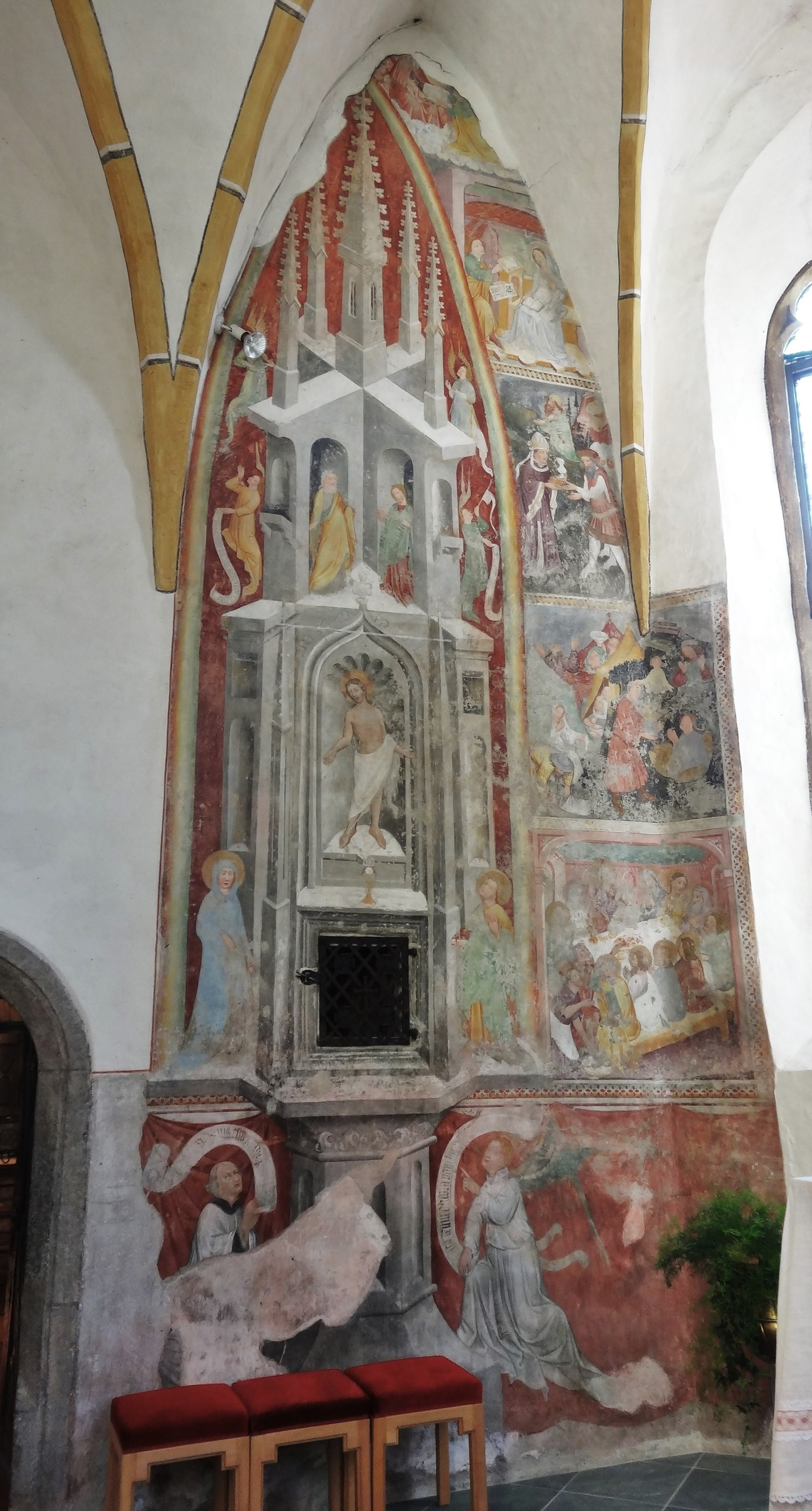 Kath. Pfarrkirche Hl. Jakobus der Ältere (Deutsch Griffen), um die Sakramentsnische in der Chor-Nordwand gemaltes Sakramentshaus